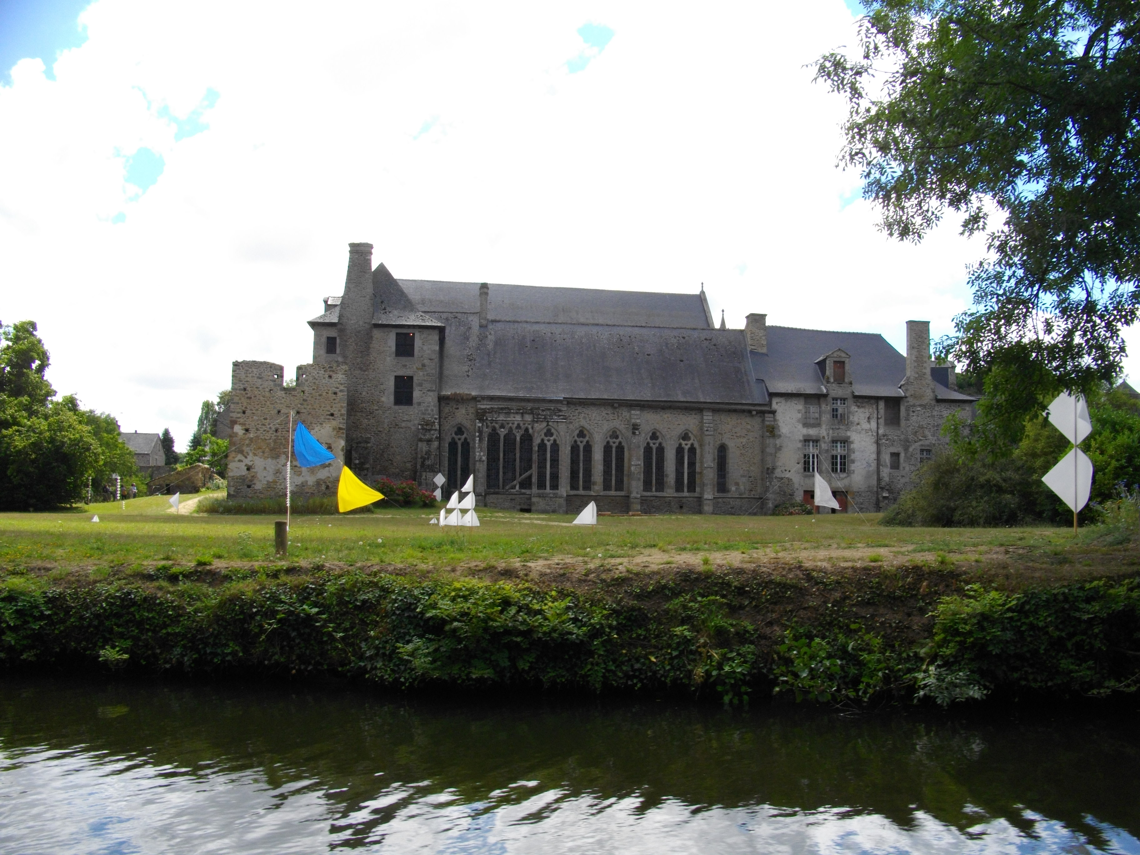 "Abbaye Saint-Magloire de Léhon" ; proche de Dinan (Côtes-d' Armor)